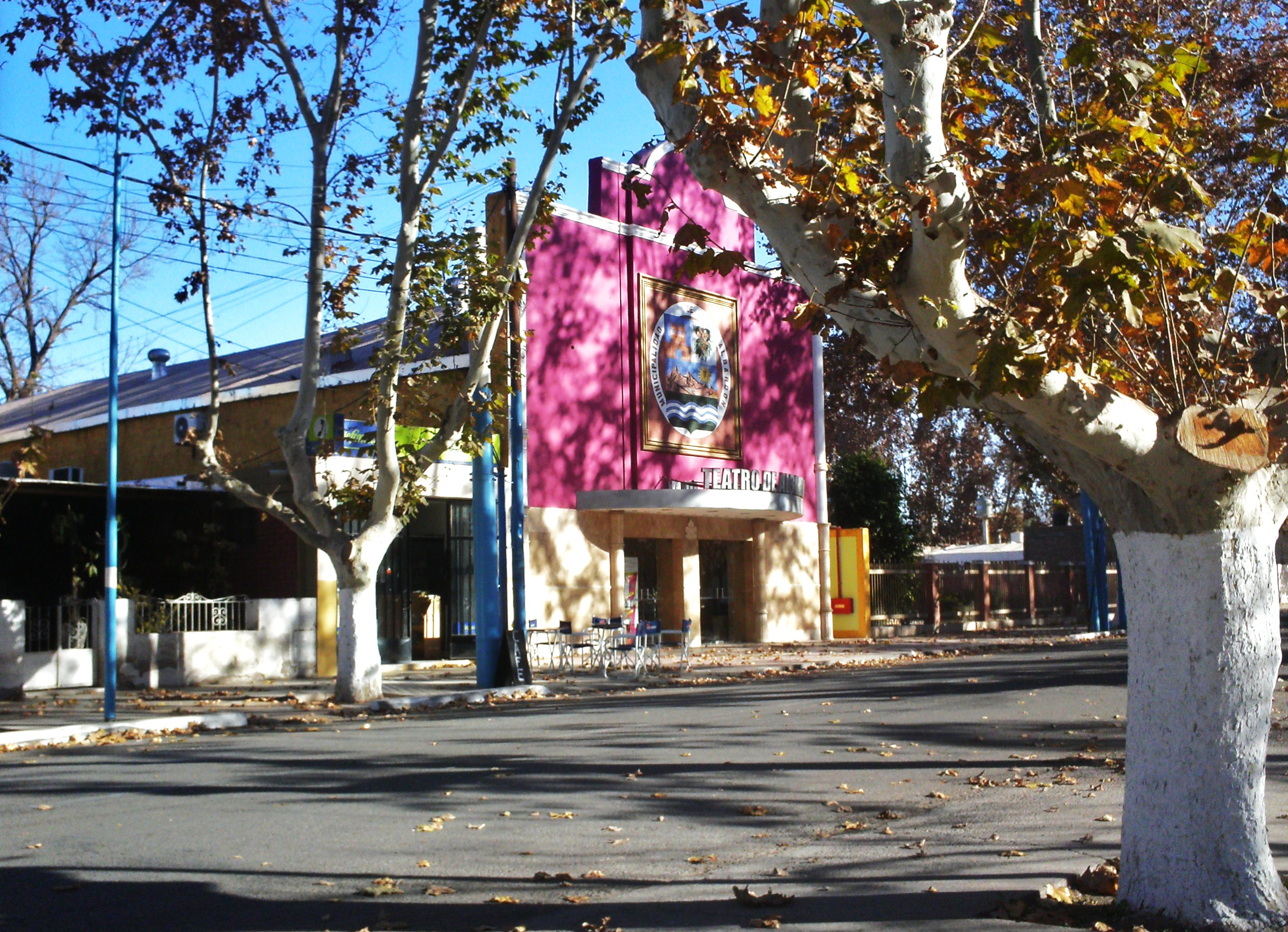 Cine Teatro Albardón, inaugurado el 23 de julio 2010.